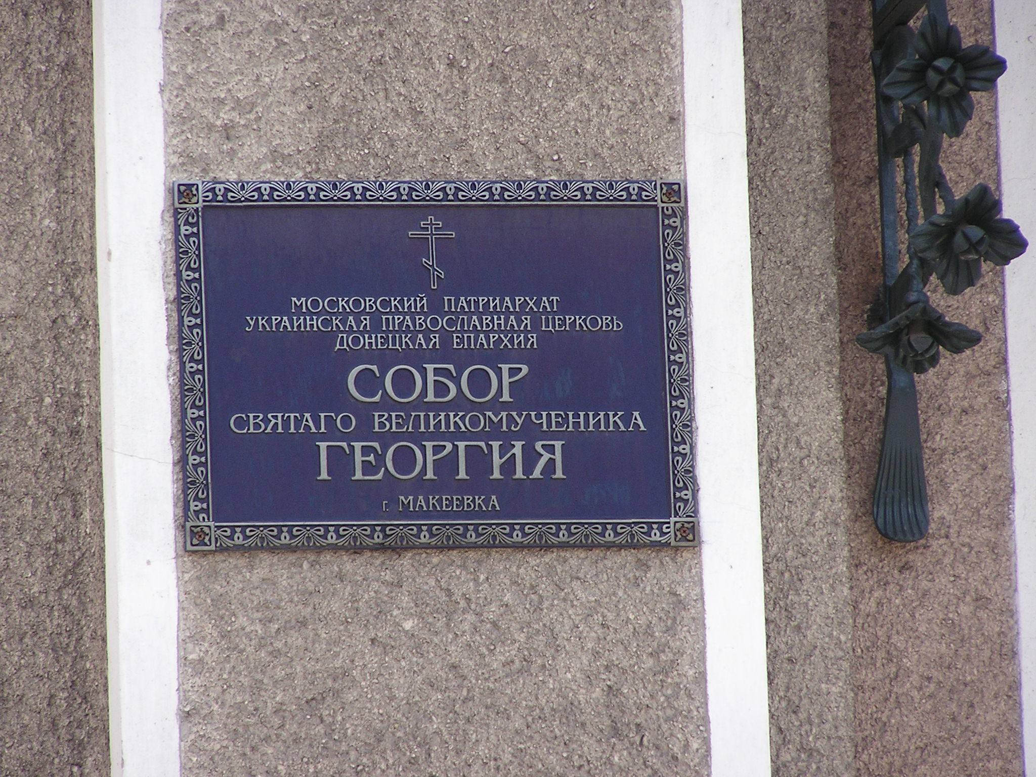 Макеевка